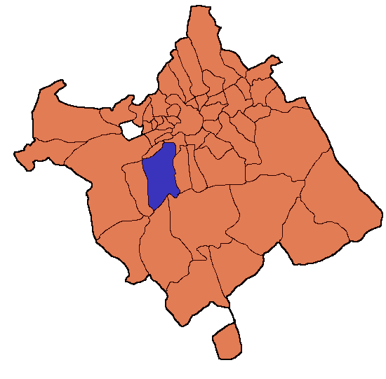 Hecho por mi